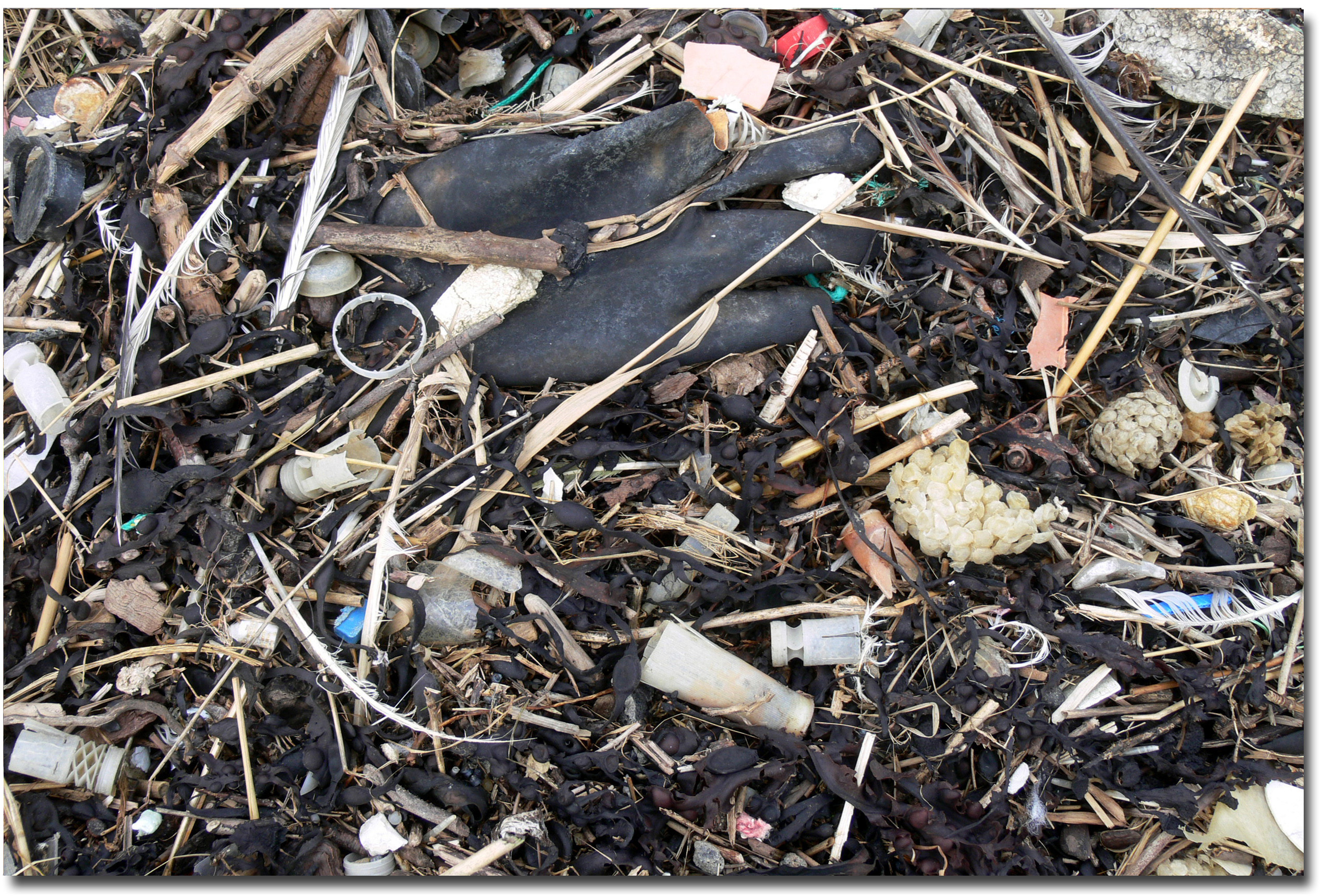 Mélanges de plantes rejetées par la mer et d'objets de fabrication humaine, dont résidus de cordes et filets de nylon (très peu et très lentement dégradables) et éléments de munitions de chasse (indicateurs d'une possible pollution par le plomb), ici sur le bord d'un petit cours d'eau (le ruisseau de la Manchue) se jetant dans la mer, en France, dans le Pas de Calais, à Audresselle.